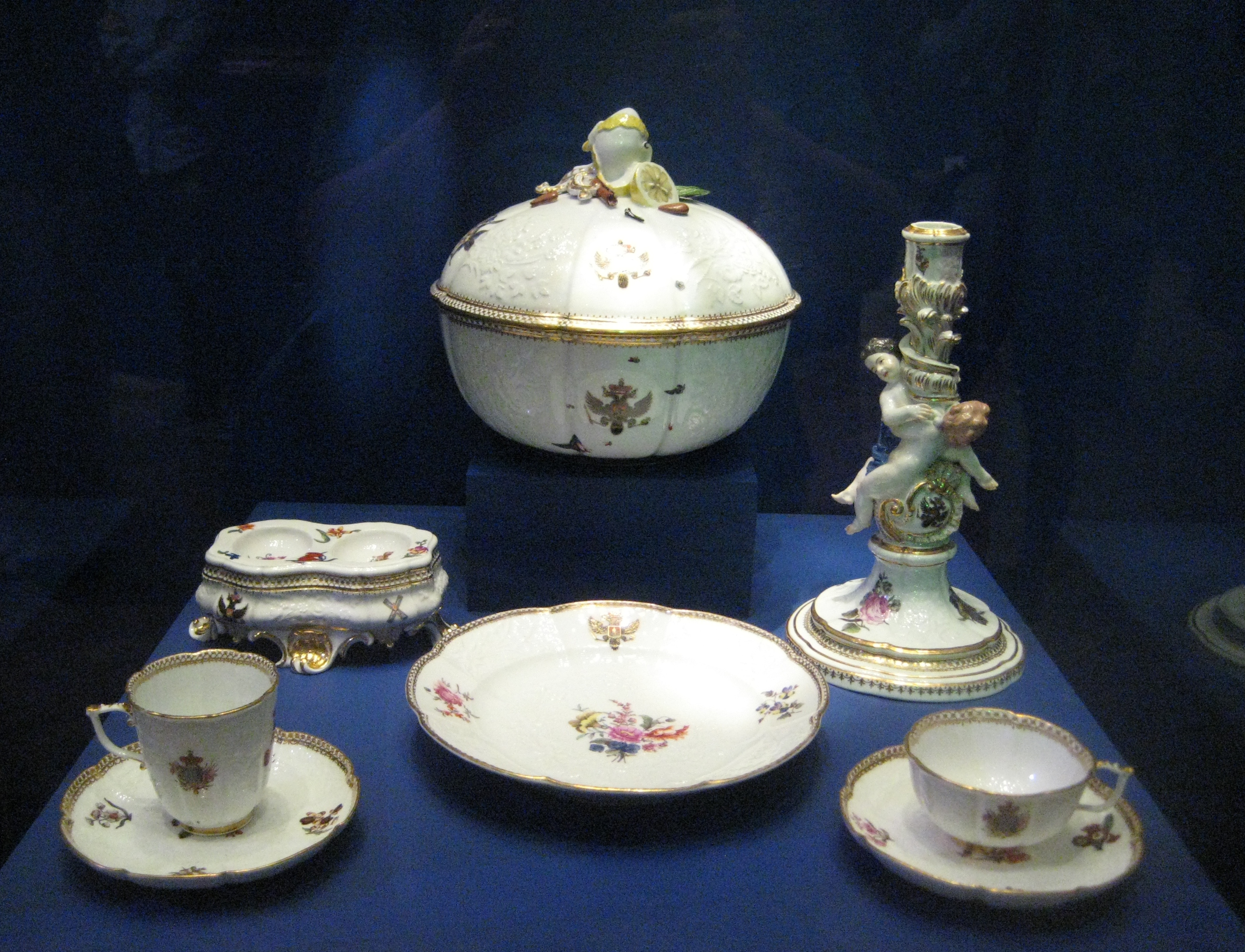 Предметы из Андреевского сервиза. Мейсенская фарфоровая мануфактура. 1744-1745. Фарфор, рельеф, надглазурная роспись, золочение: 1) Миска с крышкой, чашки с блюдцами, подсвечник (Государственный музей керамики и "Усадьба Кусково XVIII в.". 2) Тарелка мелкая (ГИМ). 3) Солонка (доделка к сервизу). Санкт-Петербургский императорский фарфоровой завод. 1860-70-е. Фарфор, рельеф, надглазурная роспись. ГИМ. Дар саксонского курфюрста и польского короля Августа III императрице Елизавете по случаю бракосочетания Петра Федоровича и Екатерины Алексеевны. Состоял более чем из 400 предметов. Использовался в придворном быту до конца 19 века.